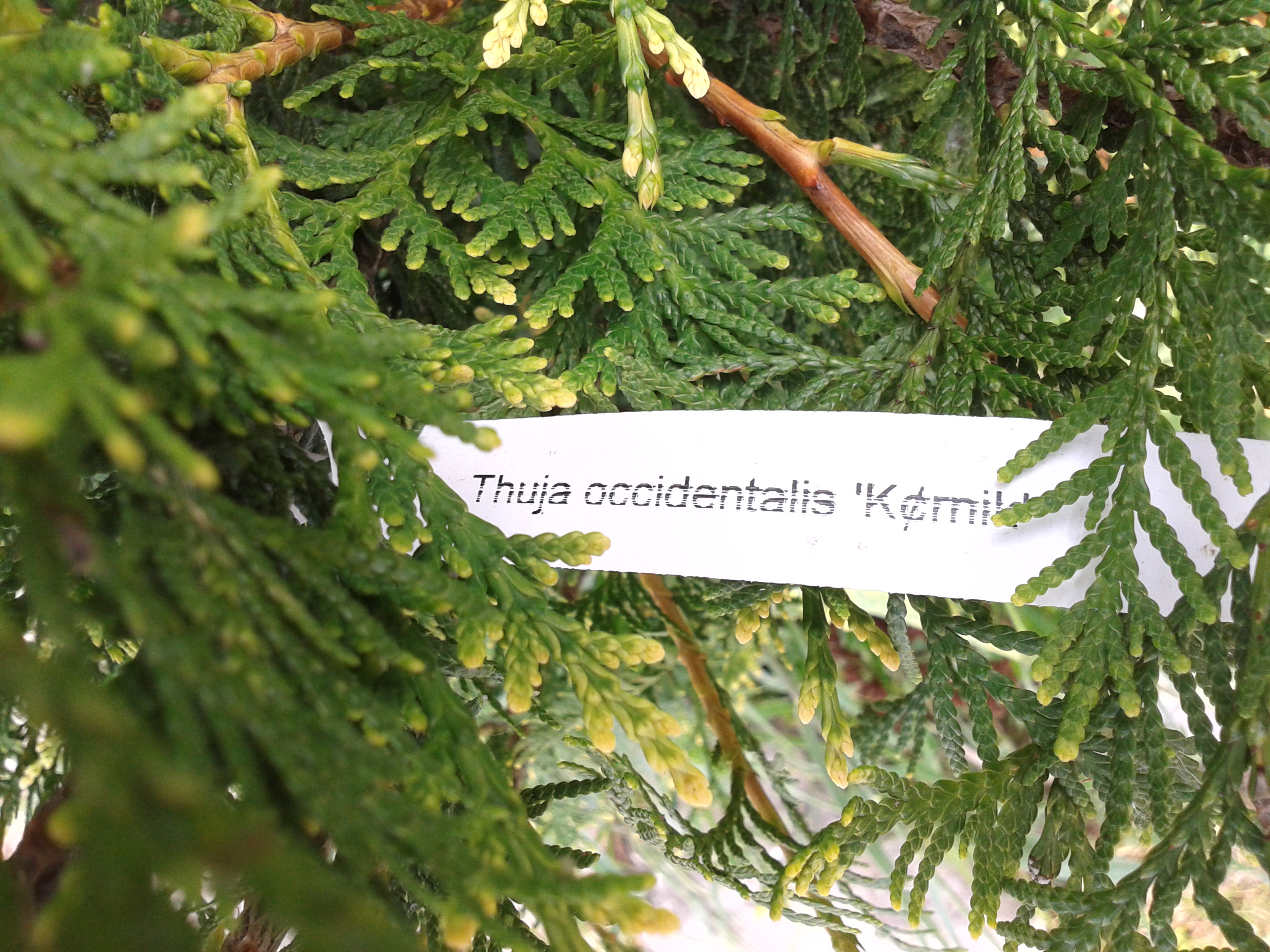 Thúja occidentális